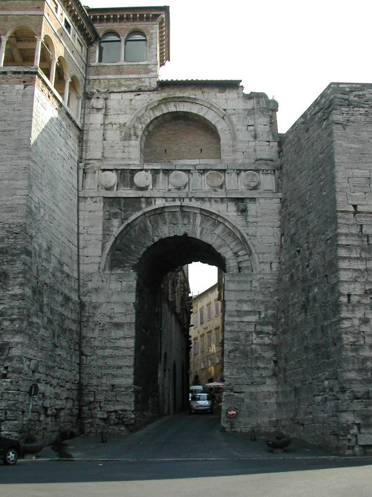 Arc Etrusque de Pérouse (Italie) Photo prise en juillet 2004 Auteur : Marc Liger Copyright : image sous GFDL Marc Liger